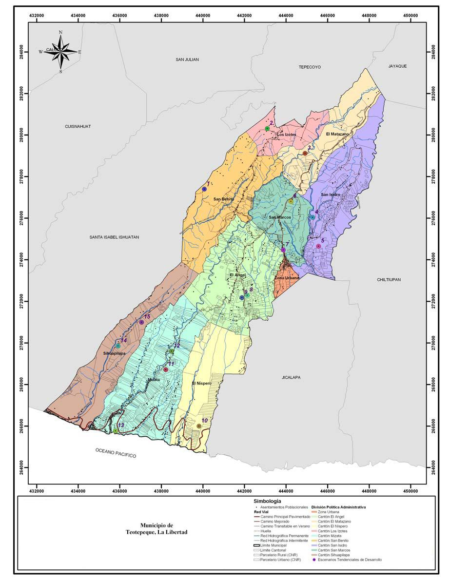 MAPA MUNICIPAL DE TEOTEPEQUE CON SU DIVICION POLITICA